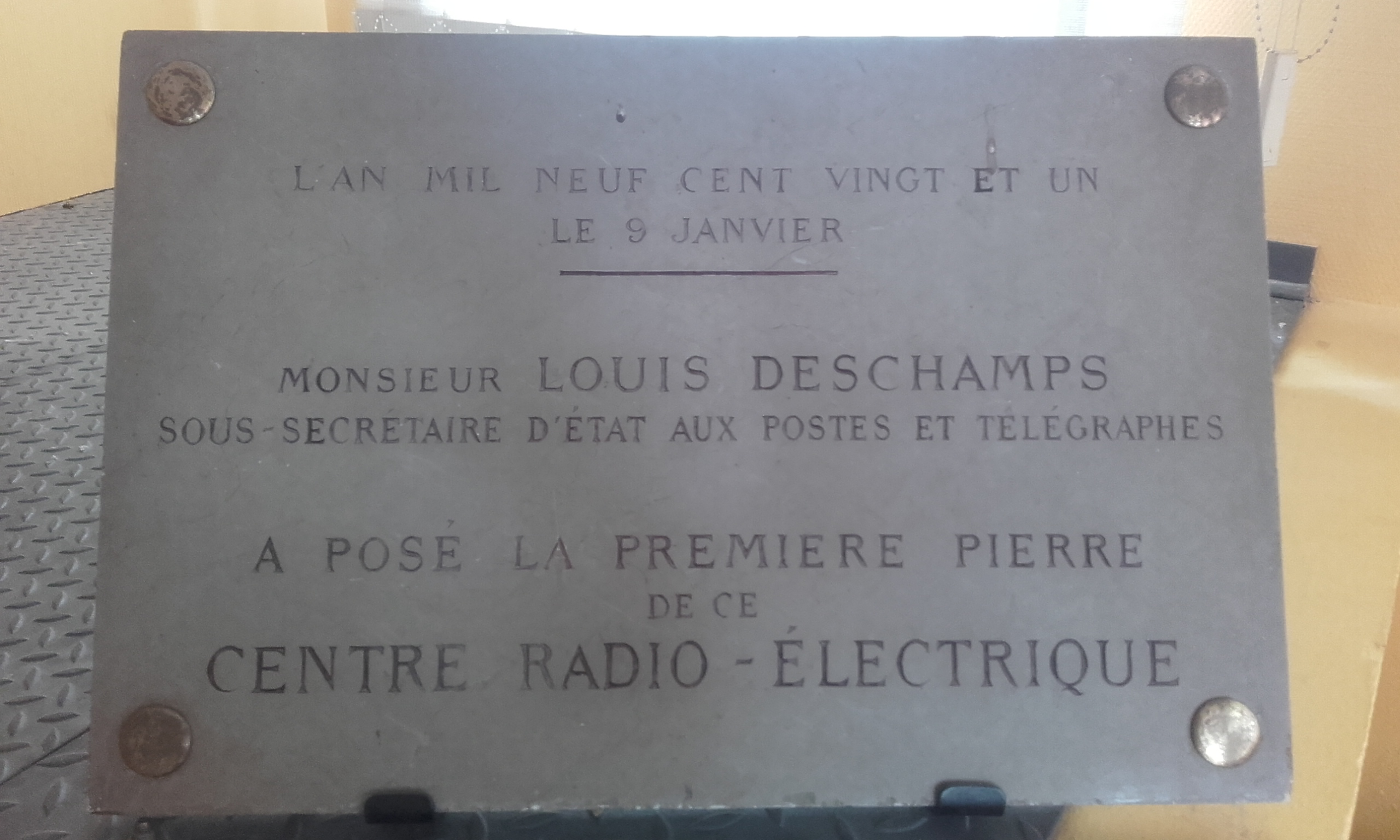 Plaque commemorative de l'innauguration du centra radioelectrique de Sainte-Assise par Louis Deschamps en 1921.